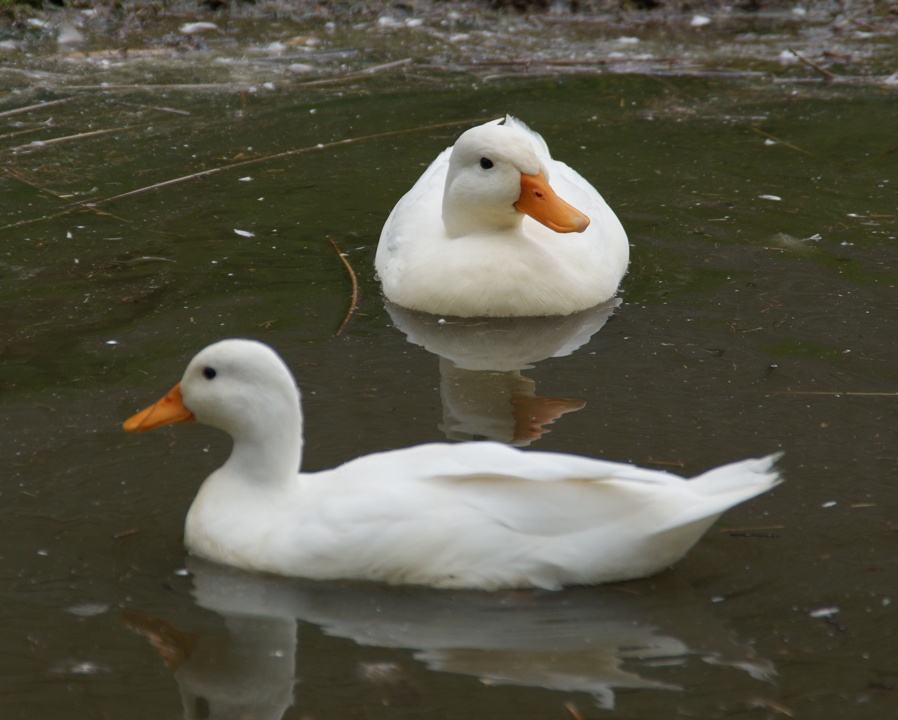 koppel witte kwaker met het vrouwtje voorop